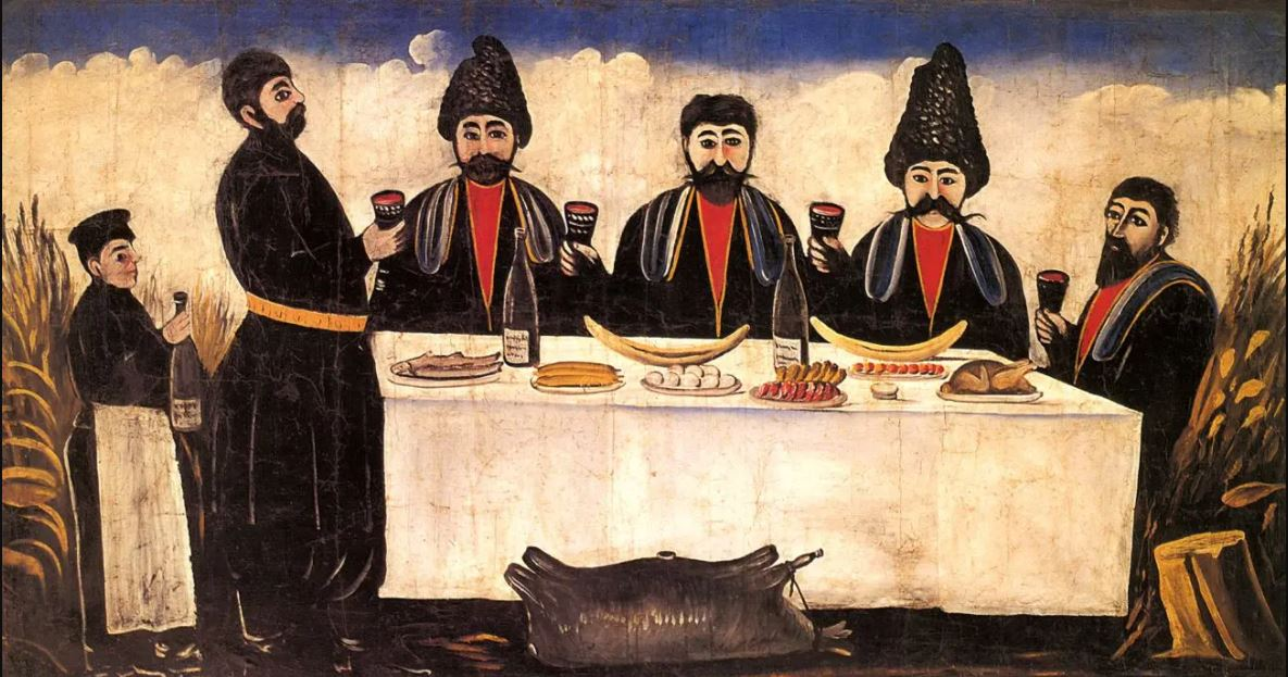 Ein georgisches Supra, häufiges Motiv in den Bildern Pirosmanis.